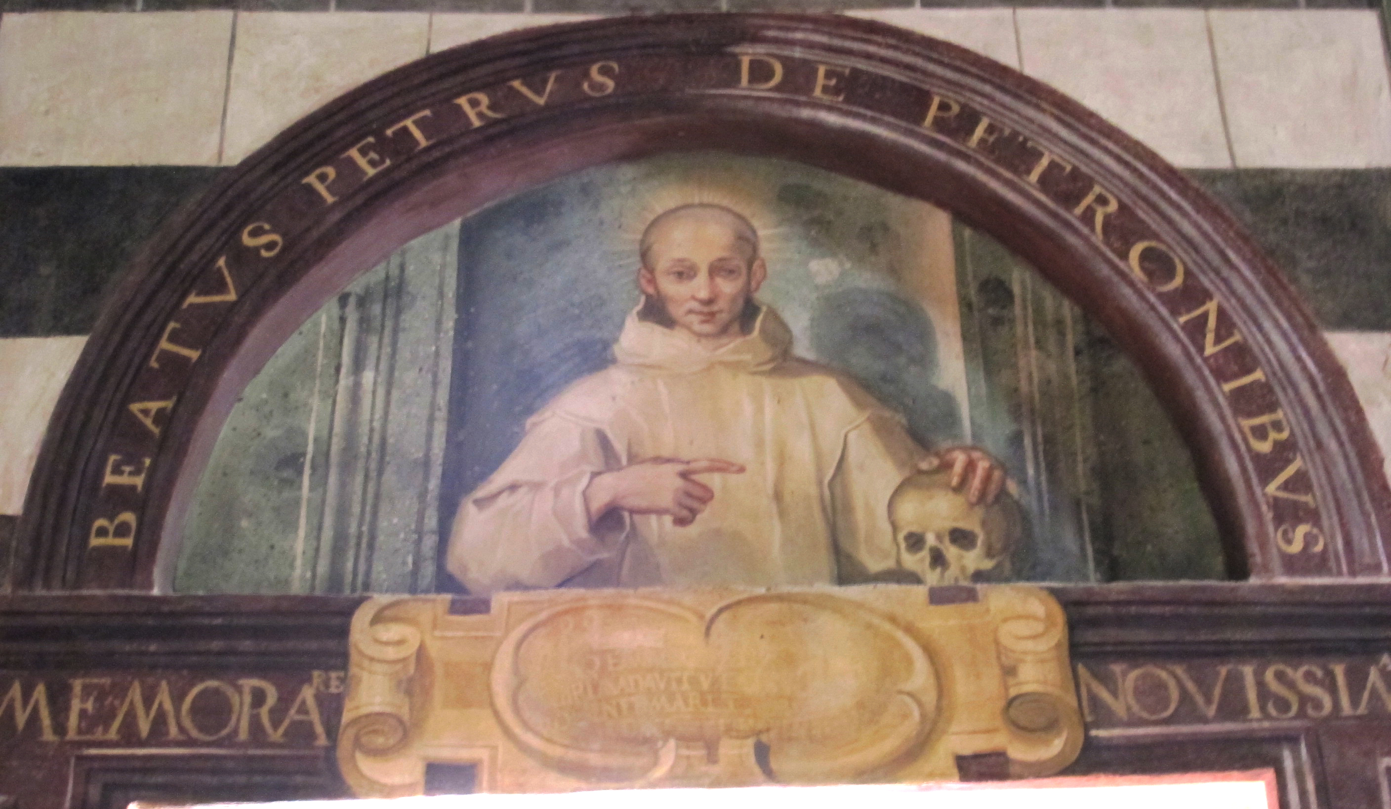 Santi Filippo e Giacomo di Castelnuovo dell'Abate, 09, ventura salimbeni, Beato Pietro Petroni